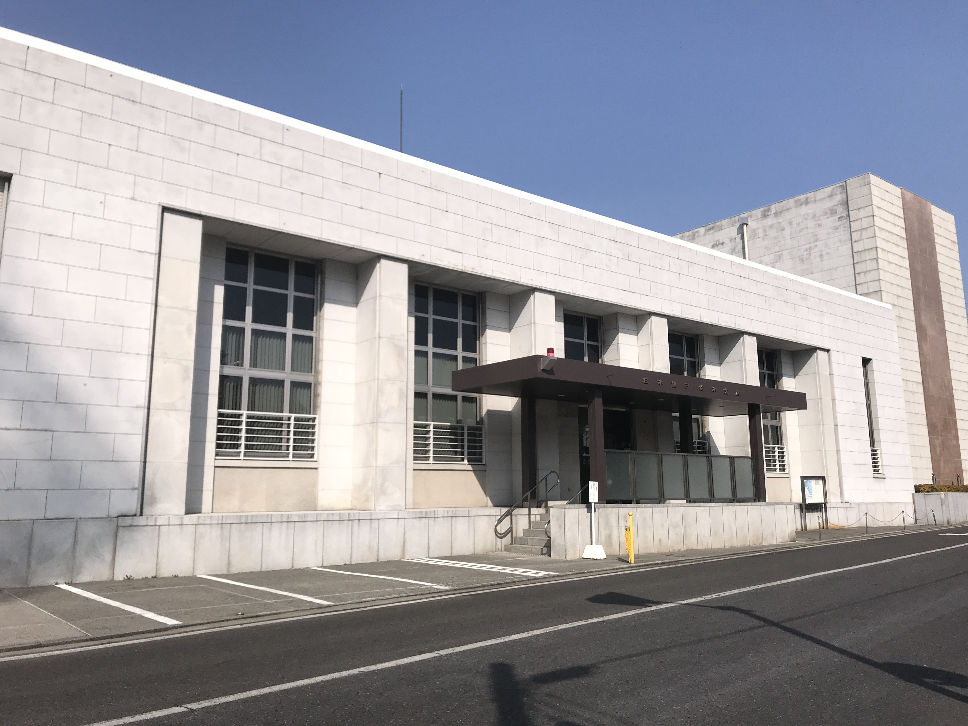 日本銀行松本支店。